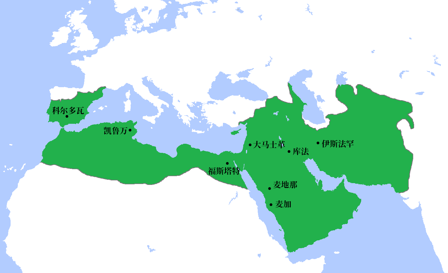 公元750年倭马亚王朝极盛时期疆域